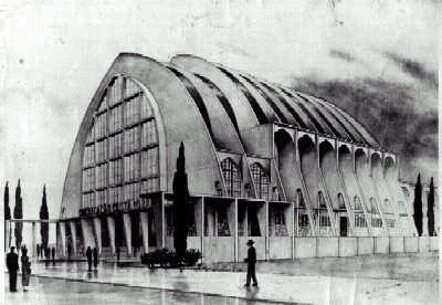 CONGREGAÇÃO CRISTÃ NO BRASIL, BRÁS, SÃO PAULO, IMAGEM DE DOMÍNIO PÚBLICO. 20:47, 1 Abril 2006 Joabsantos 400x276 (29325 bytes) (CONGREGAÇÃO CRISTÃ NO BRASIL, BRÁS, SÃO PAULO, IMAGEM DE DOMÍNIO PÚBLICO.)